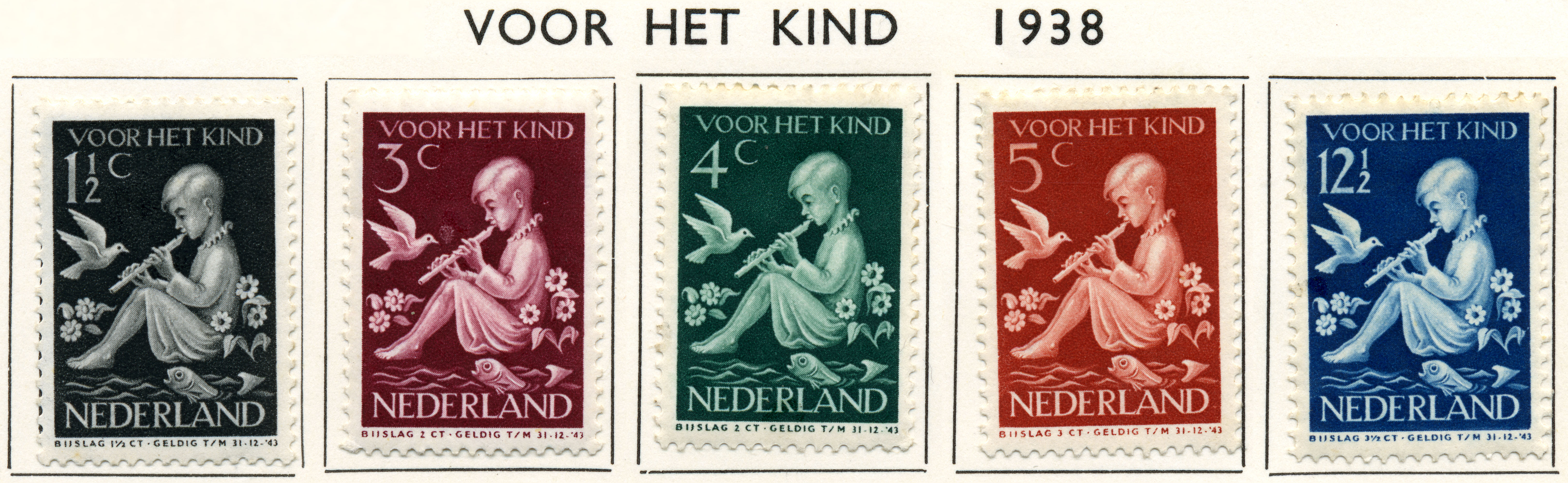 Kinderzegels (1938) Fluitspelend kind. Ontwerp van Pam G. Rueter